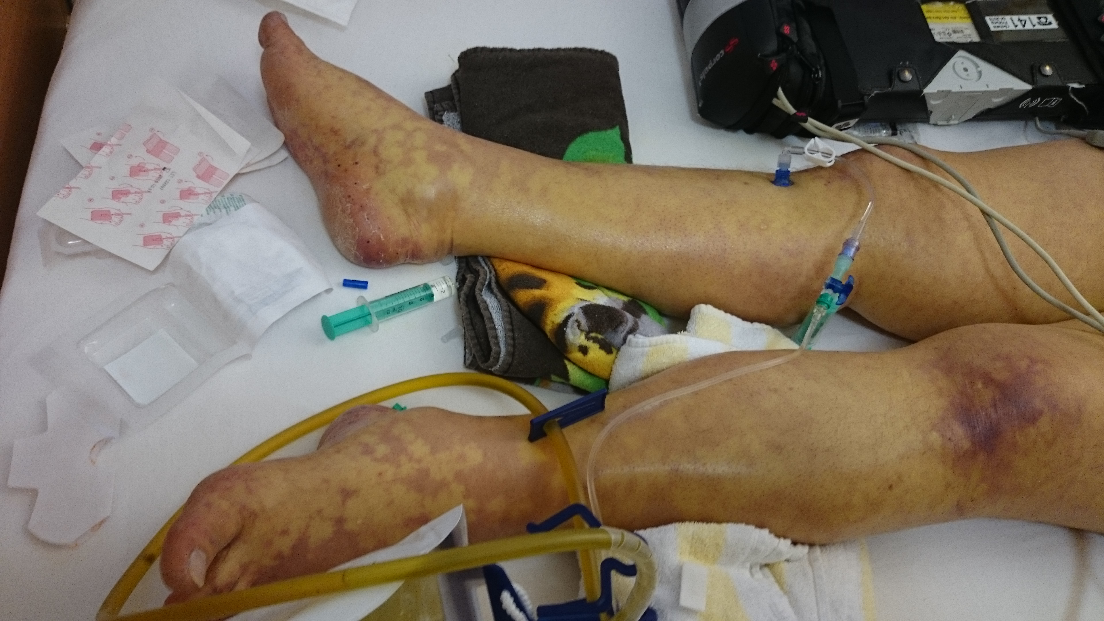 Patientin mit schwerem septischen Schock und Ischämiezonen an der Haut bei Mikrothromben